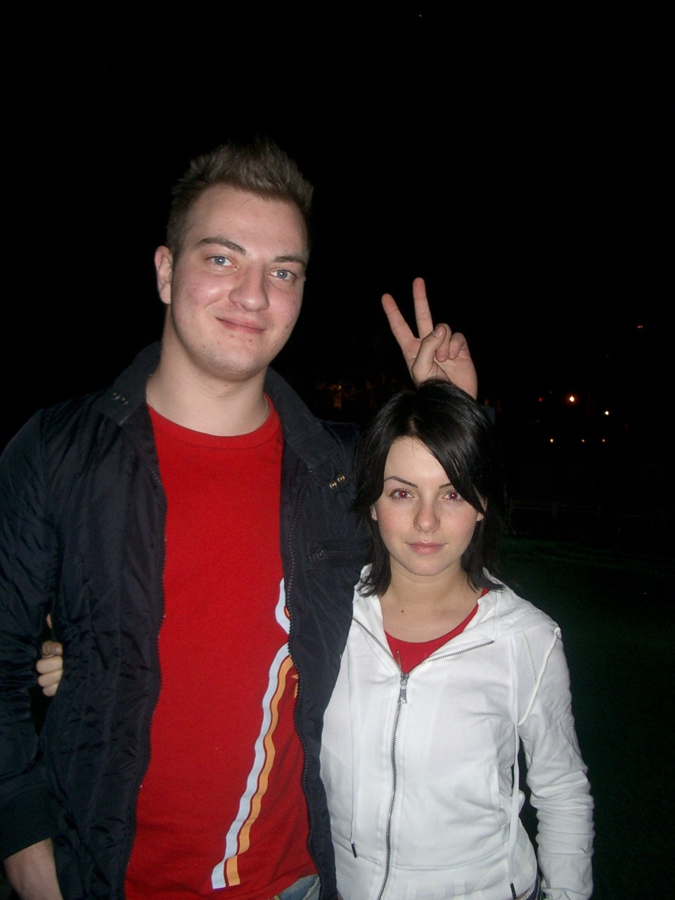 Sergio Galoyan (Галоян, Сергей) and Yulia Volkova (Волкова, Юлия Олеговна) in 2004